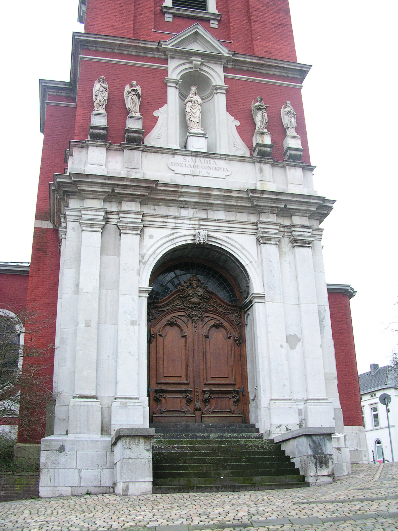 rk. Pfarrkirche St. Michael in Aachen Burtscheid, Tür im Turm mit Marienstatue und vier Engeln